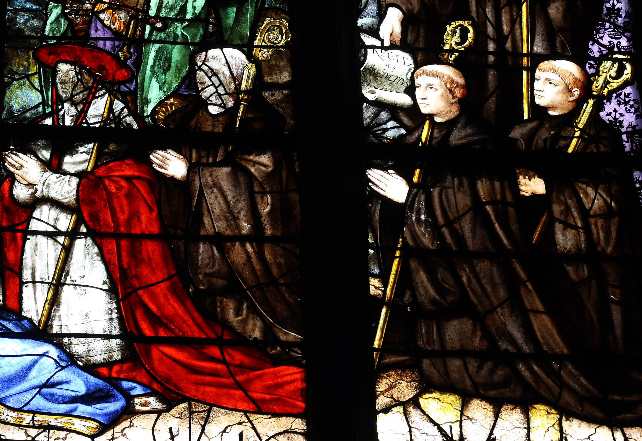 Bleiglasfenster Nr. 8 (16. Jahrhundert) in der katholischen Pfarrkirche Saint-Martin (Collégiale Saint-Martin) in Montmorency, Darstellung: Söhne von Guillaume Gouffier (siehe: Dominique Foussard, Charles Huet, Mathieu Lours: Églises du Val-d'Oise. Pays de France, Vallée de Montmorency, Société d'Histoire et d'Archéologie de Gonesse et du Pays de France, 2. Auflage, Gonesse 2011, ISBN 9782953155426)